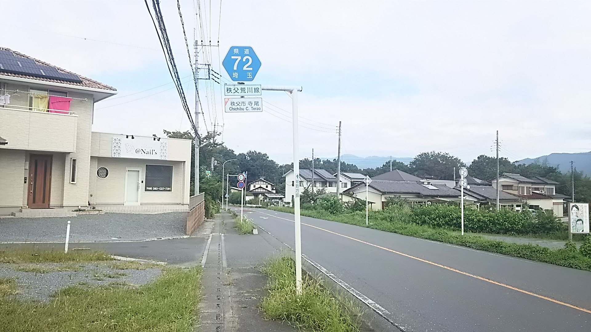 2019年9月撮影、秩父市にて